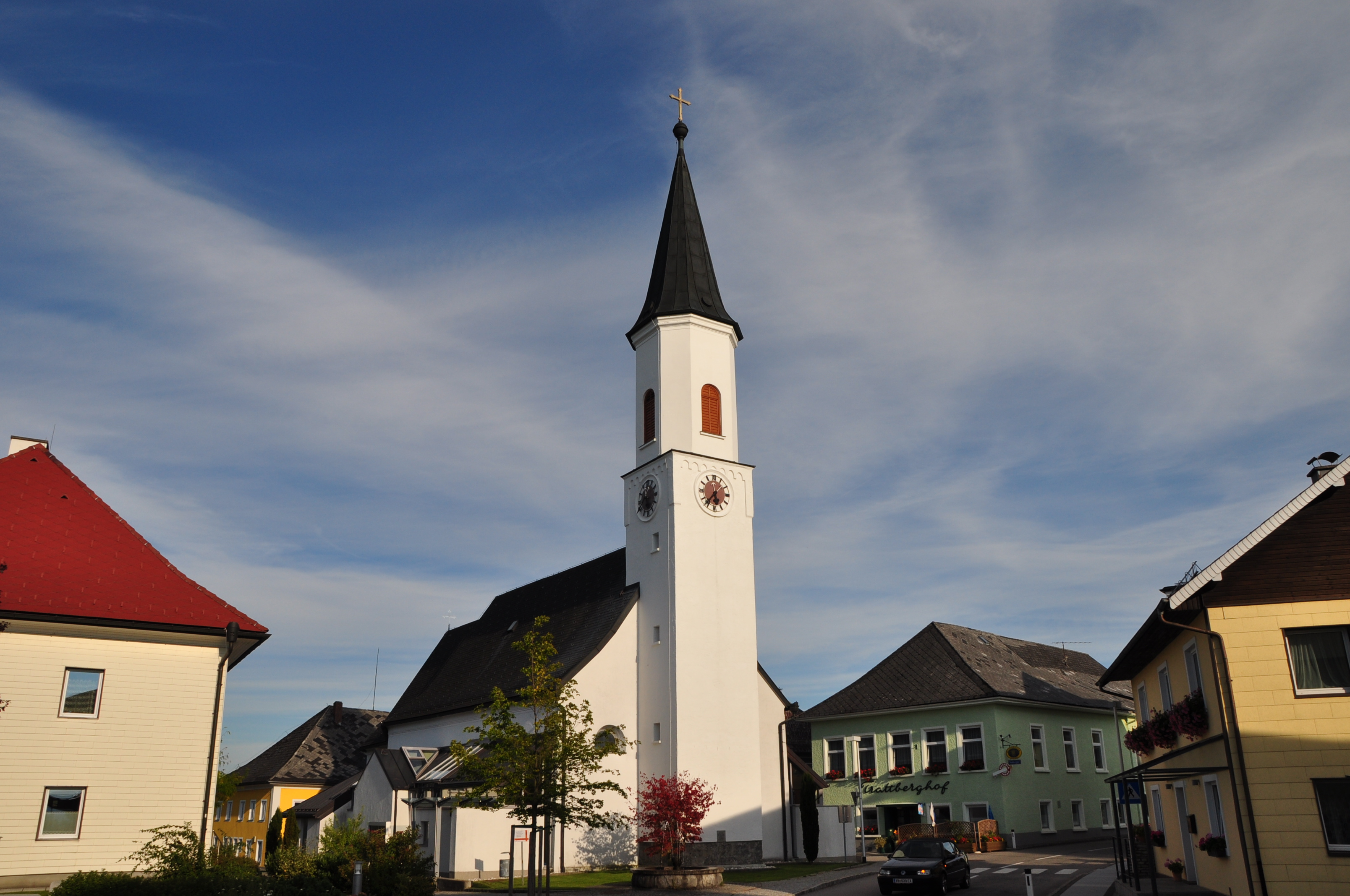 Kath. Pfarrkirche hl. Jakobus und ehem. Friedhofsfläche, Puchkirchen am Trettberg